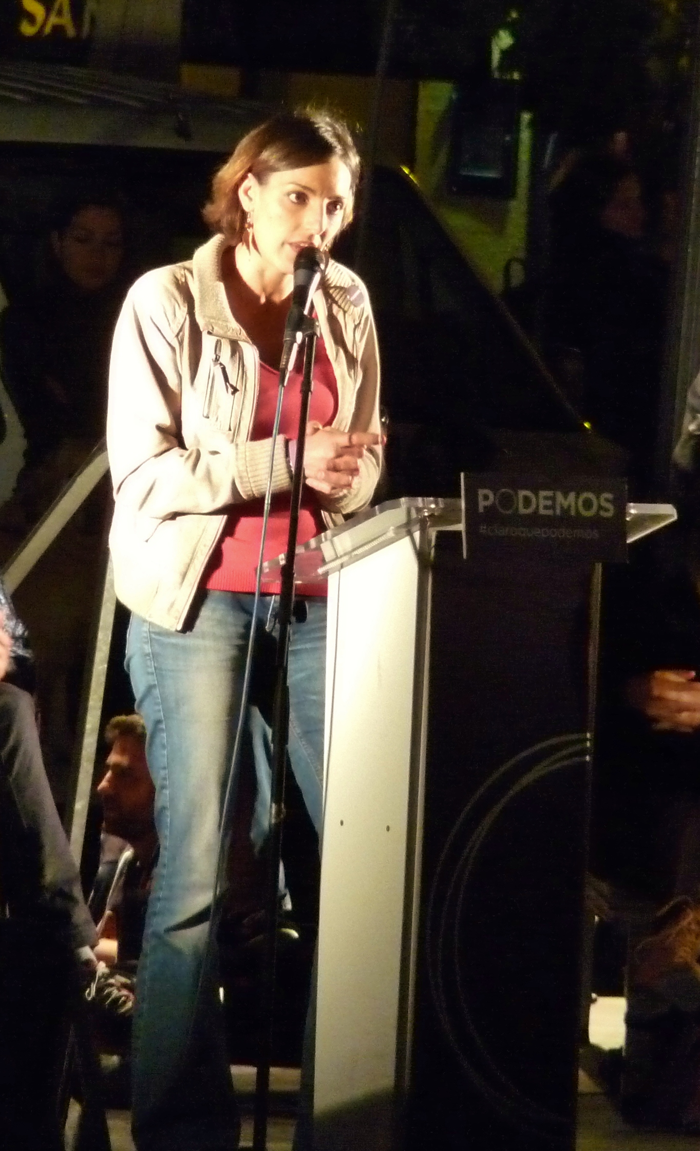 Lola Sánchez en el mitín de fin de campaña de las elecciones europeas de 2014 celebrado el 23 de mayo en Madrid.